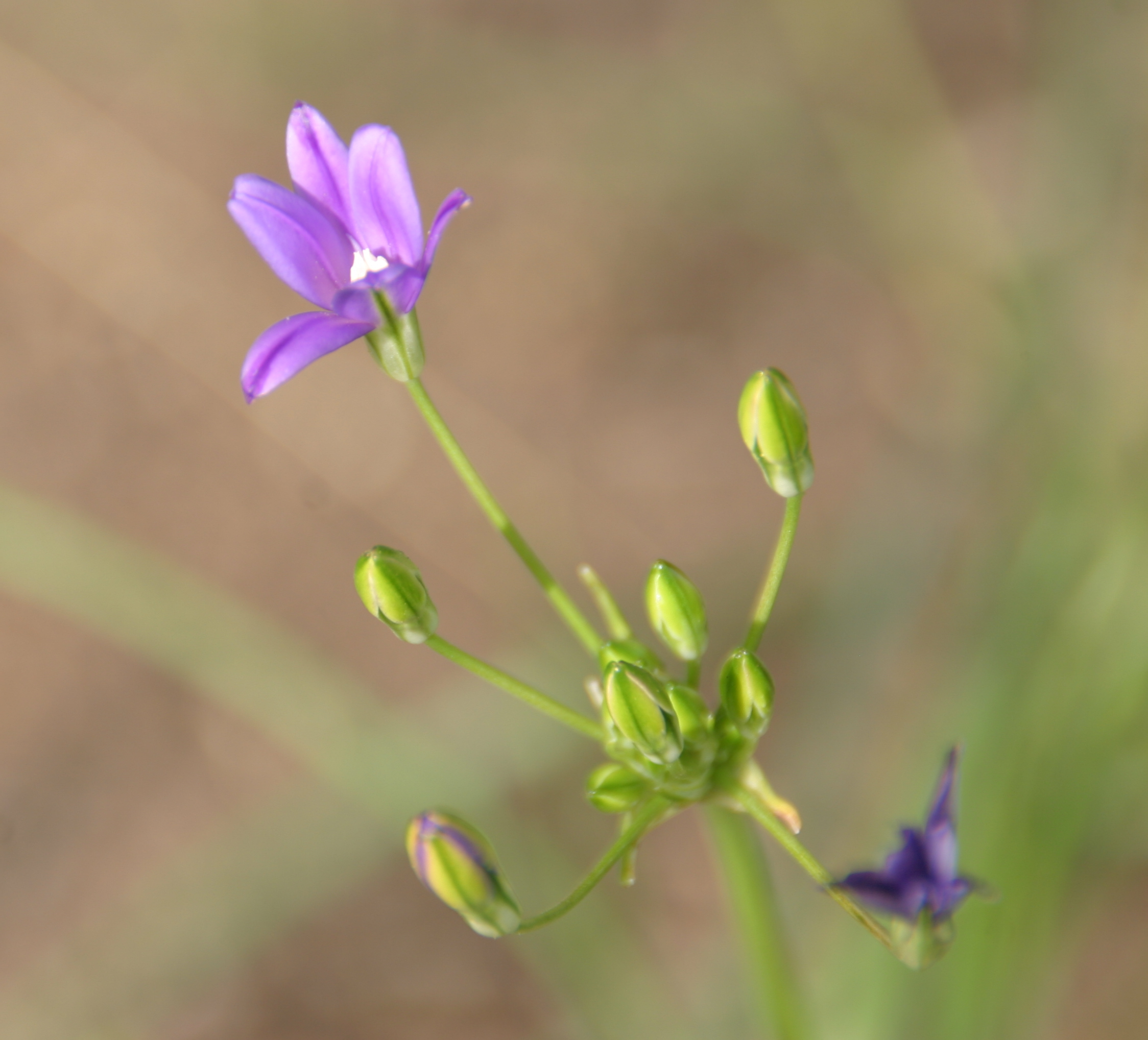 Brodiaea filifolia (thread-leaved brodiaea)